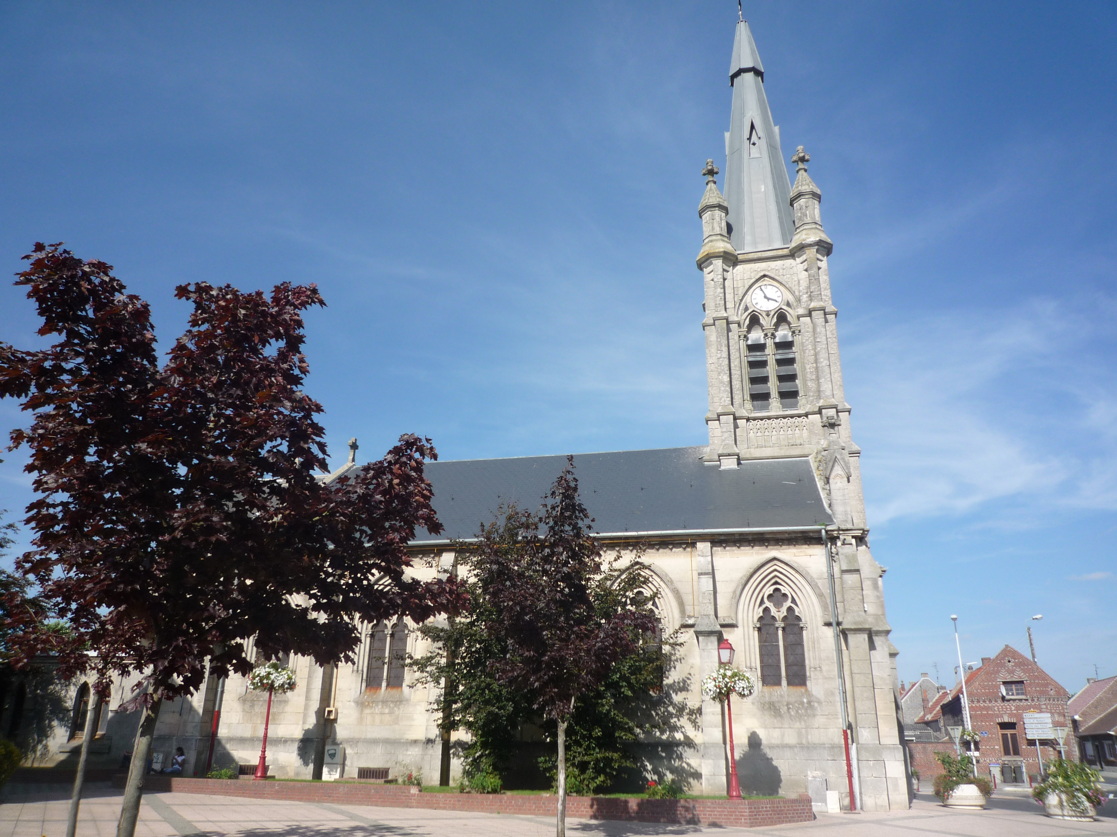 Église Saint-Nicolas de Monchecourt, Nord, Nord-Pas-de-Calais, France.